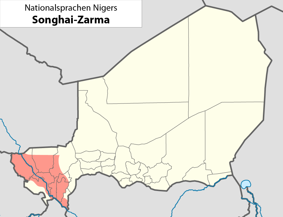 Nationalsprachen des NigerDie dargestellte Nationalsprache kann dem Dateinamen entnommen werden.